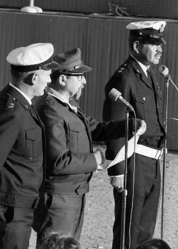 ברכת הרב הראשי לצה"ל תא"ל מרדכי פירון להשקת ספינת הטילים אח"י קשת במספנות ישראל אוגוסט 1973